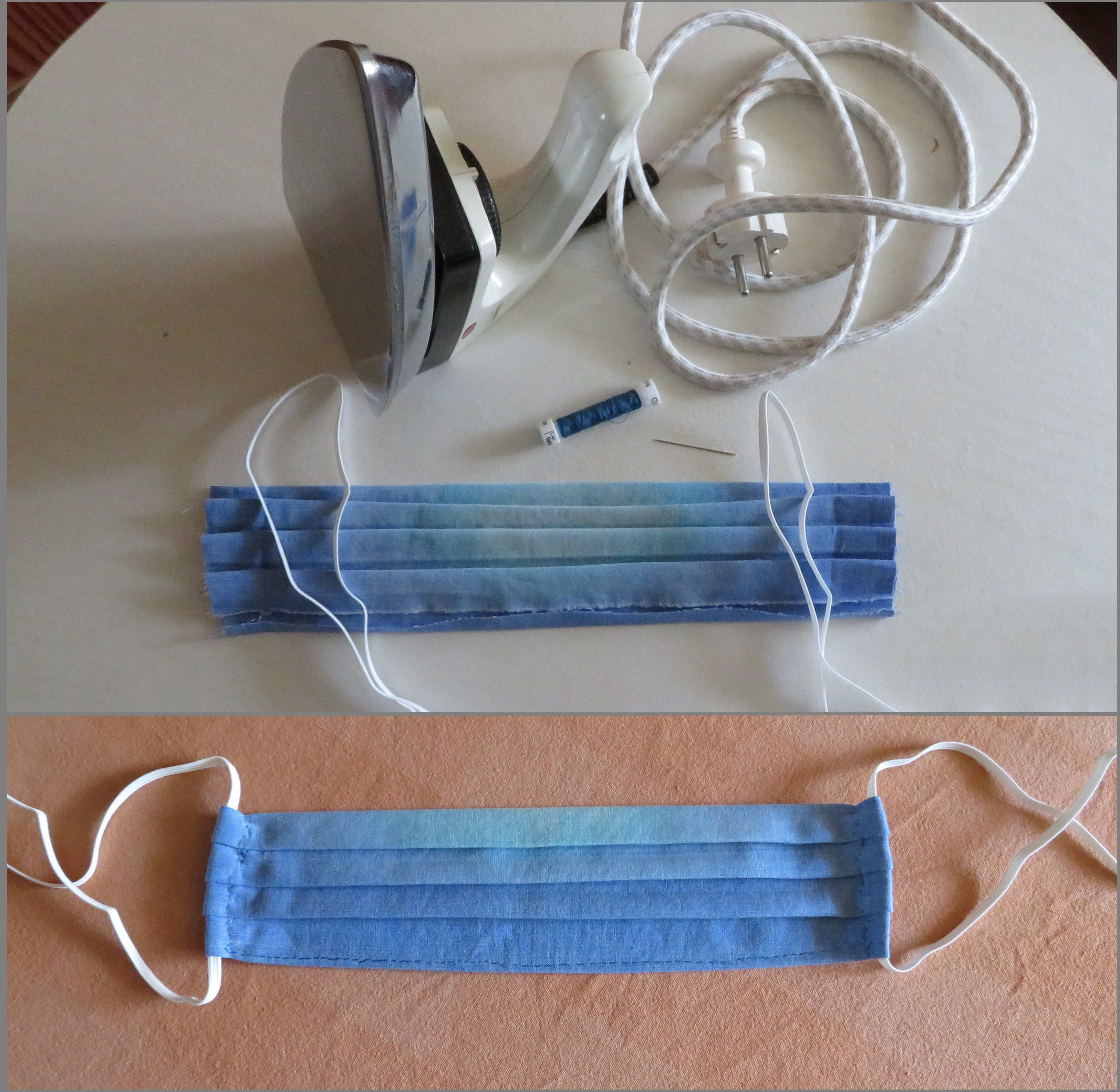 Einfacher Behelfs-Mund-Nasen-Schutz aus einem doppelt gelegten Baumwolltuch ohne Nähmaschine nur mit ein paar Stichen von Hand hergestellt. Die Falten wurden vor dem Nähen reingebügelt. Der Stoff kann nach dem Tragen durch Bügeln desinfiziert werden oder bei 70 °C im Backofen. Das Material ist ein Baumwollstoff mit Farbverlauf zwischen blau und türkis.